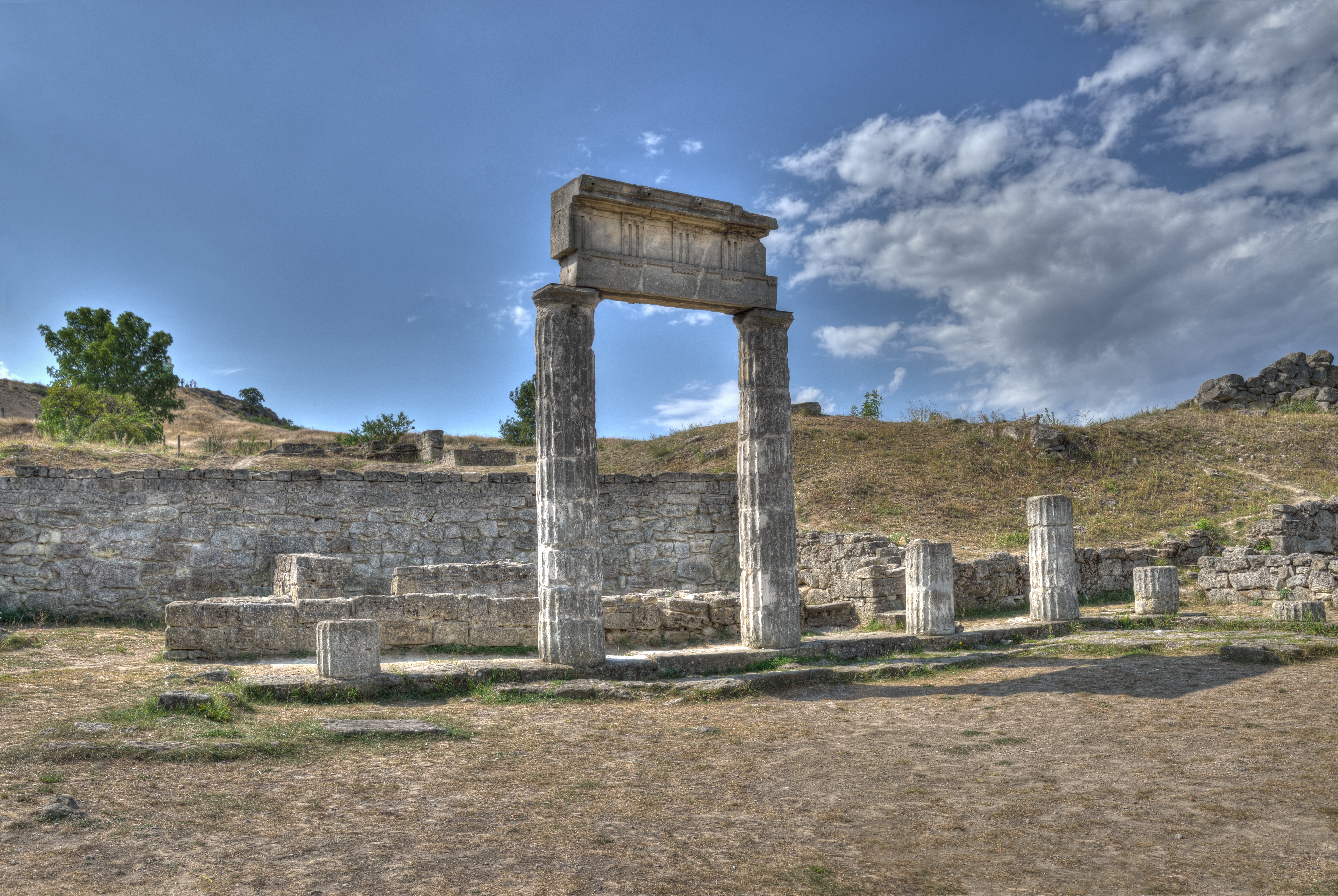 Архітектурно-археологічний комплекс «Стародавнє місто Пантікапей», Керч, вул. Рибакова, гора Мітрідат, північний та північно-східний схили